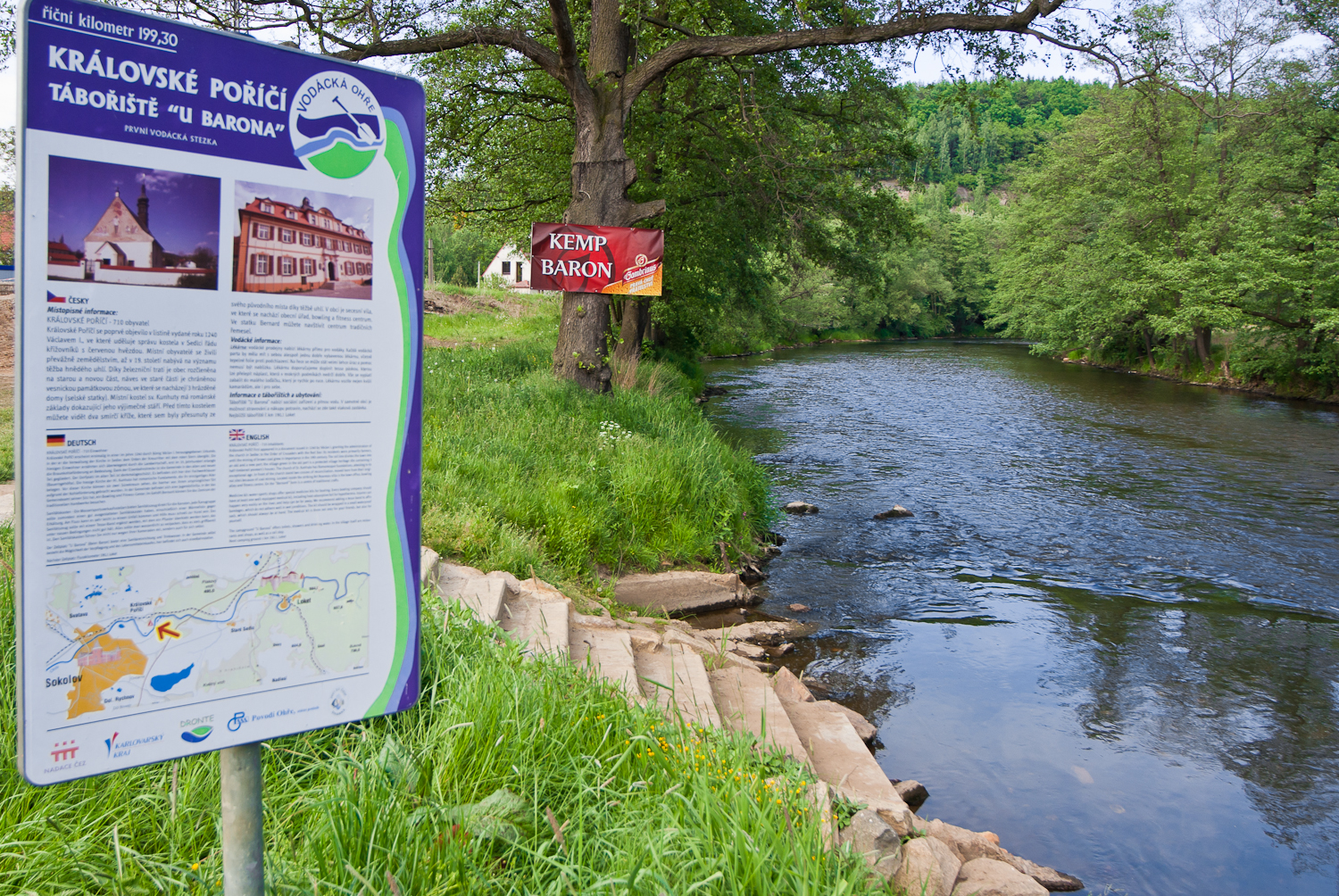 Ohře, Královské Poříčí u Sokolova